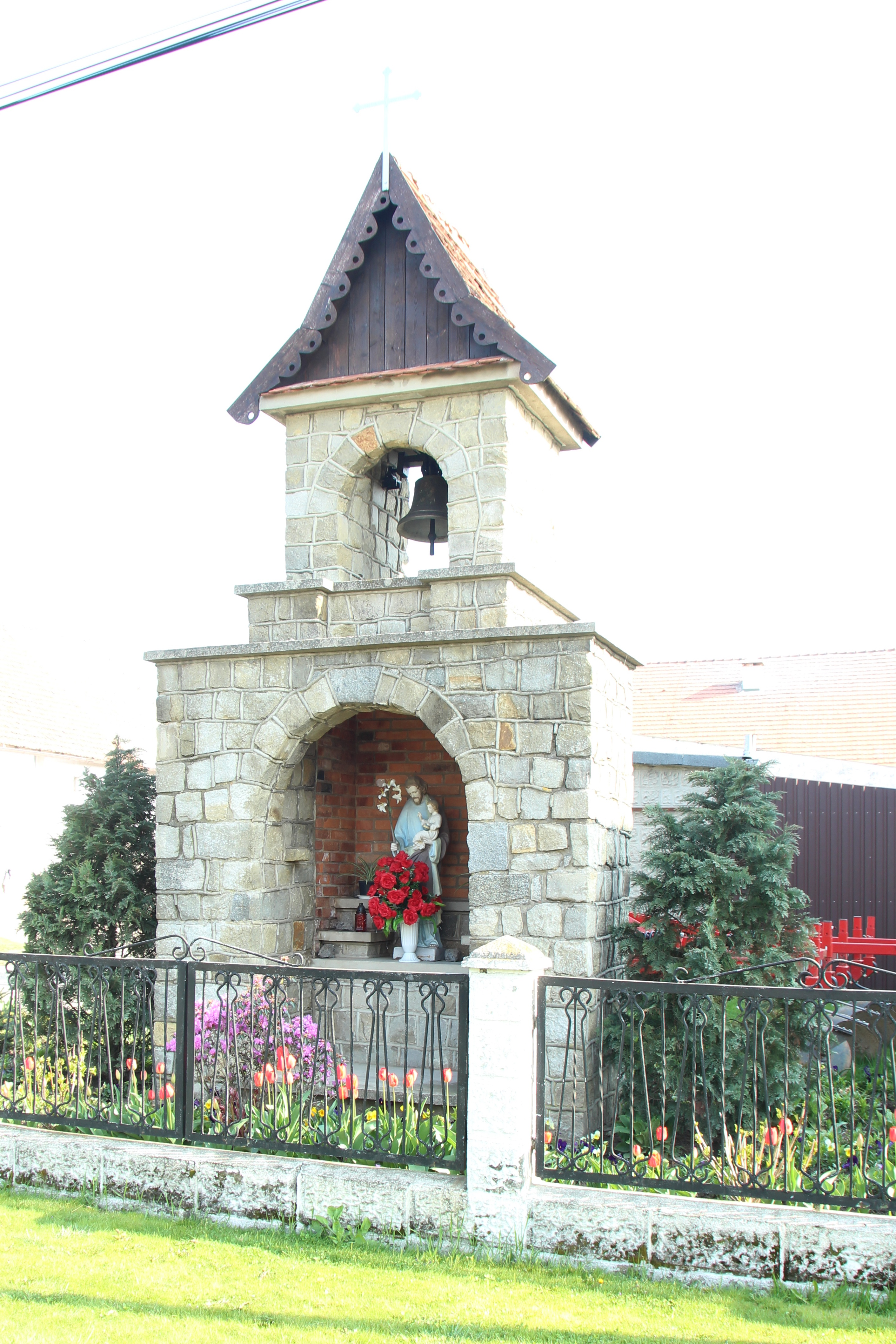 Wojstraż dzielnica Włostowa – wieś w Polsce położona w województwie opolskim, w powiecie nyskim, w gminie Korfantów.